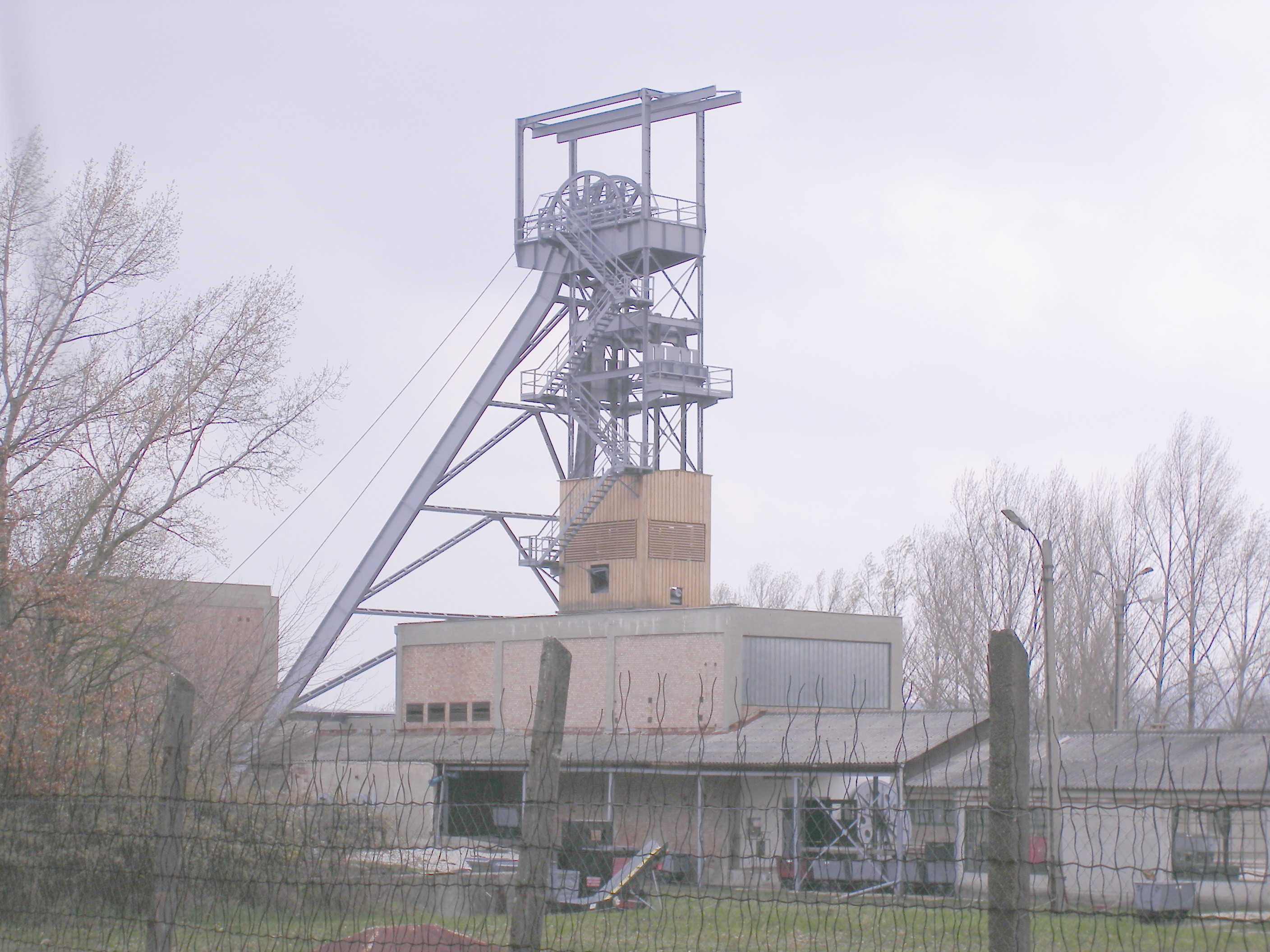 Oroszlány - 20. (majki) akna (bányászati kiállítás)